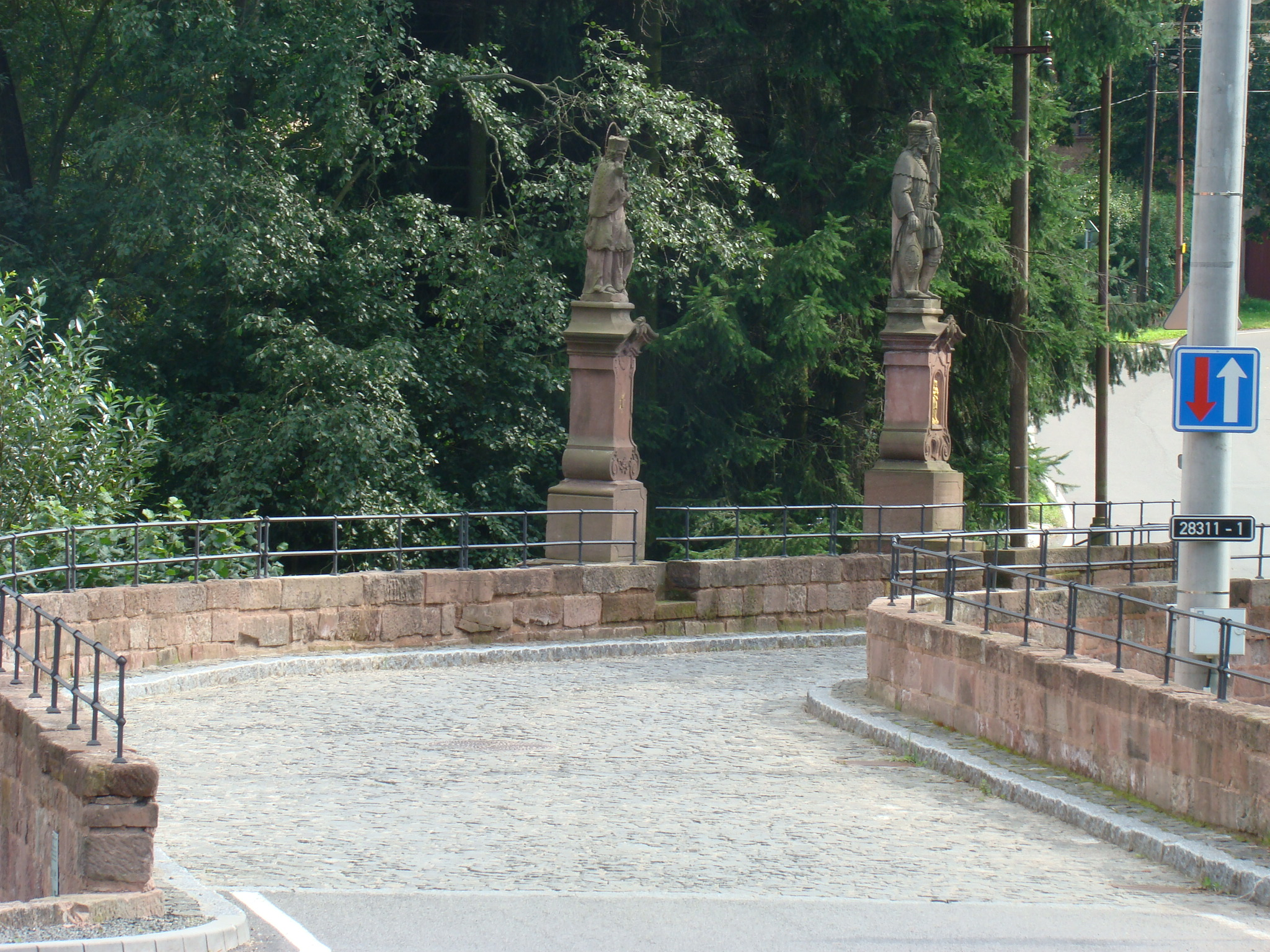 Libštátský kamenný most z počátku 19. století